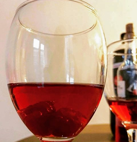 Mixología: la mistela es un licor tradicional costarricense, similar al vino pero hecho con frutas tropicales. Esta es una mistela de mora con poca fermentación, posee trozos de fruta.